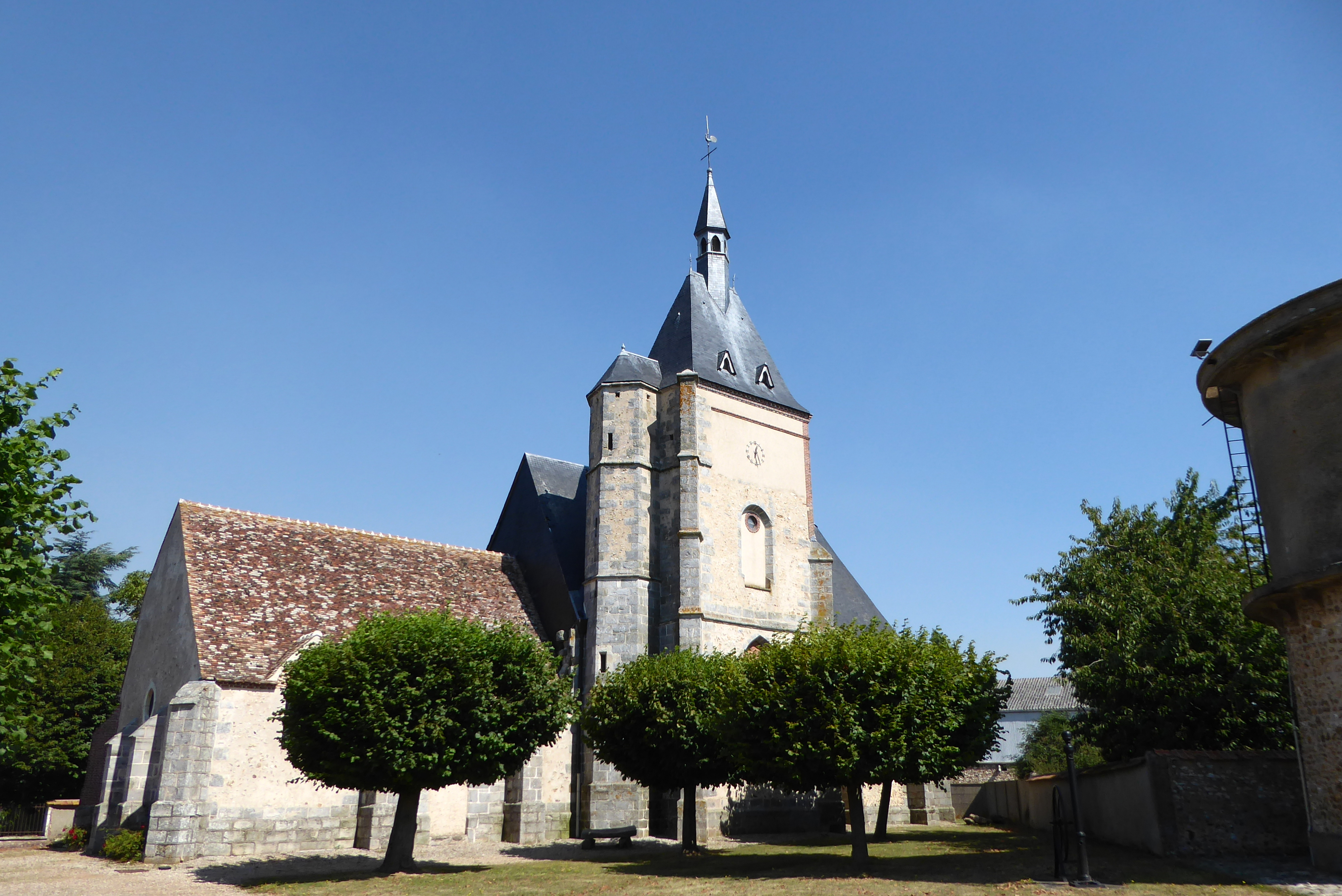 Façade sud de l'église Saint-Rémi, à droite la pompe et l'ancien château d'eau, Le Boullay-Mivoye, Eure-et-Loir (France).